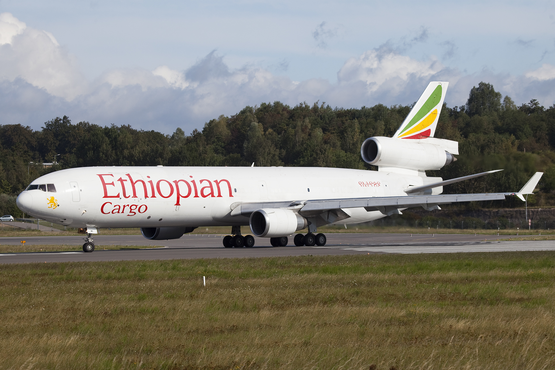 Luxembourg